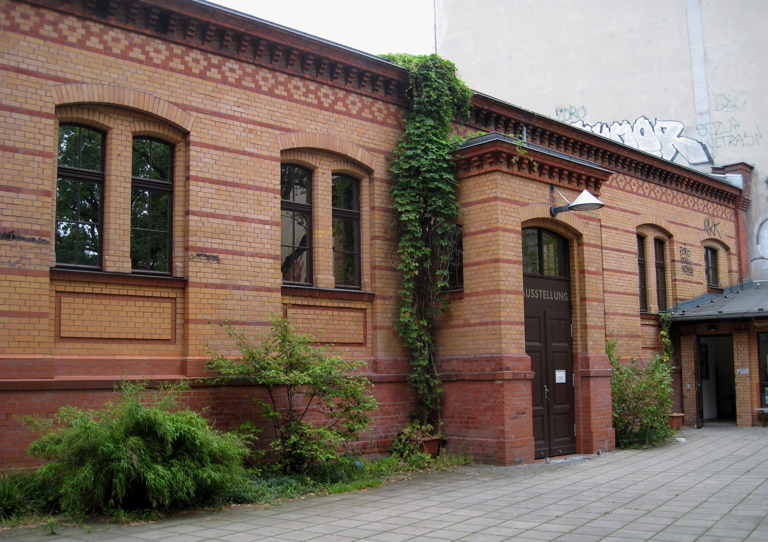 Museum Pankow (ehemals Prenzlauer Berg Museum in Berlin-Prenzlauer Berg. Veranstaltungs- und Ausstellungshalle Prenzlauer Allee 227/228 des Museums Pankow (umgebaute ehemalige Schulturnhalle).